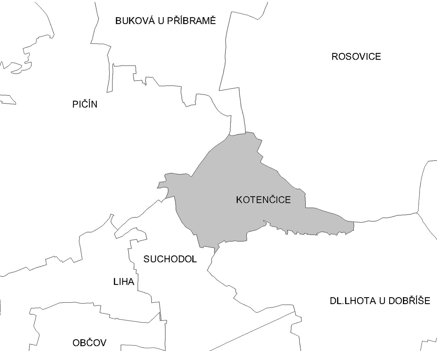 Katastr Kotenčic